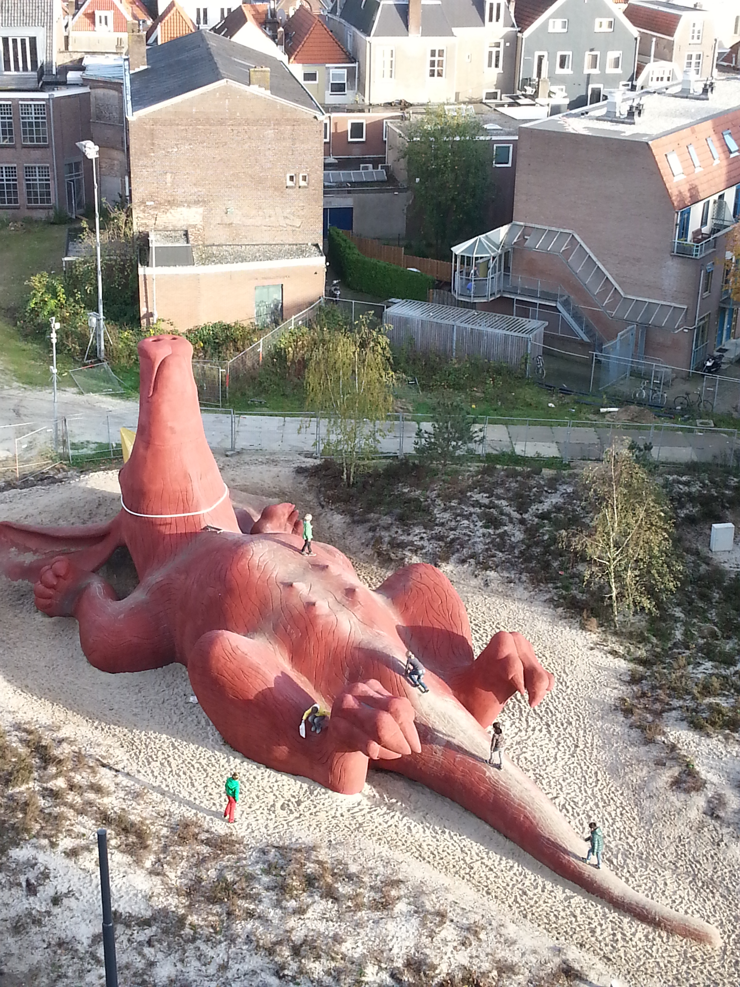 Feestaardvarken, Bartokplein, Arnhem